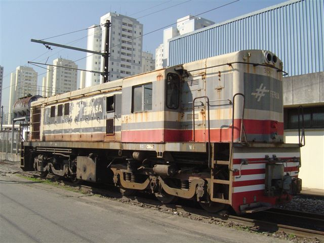 Locomotiva do Trem Intra Metropolitano (TIM)